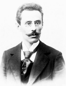 foto dello scacchista polacco David Janowski